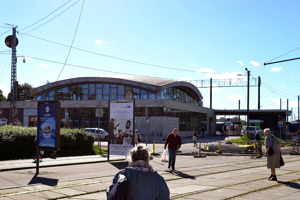 Tallinnas Balti jaamas asuv linnalähedaste rongide reisijate ootepaviljon 2016. aastal